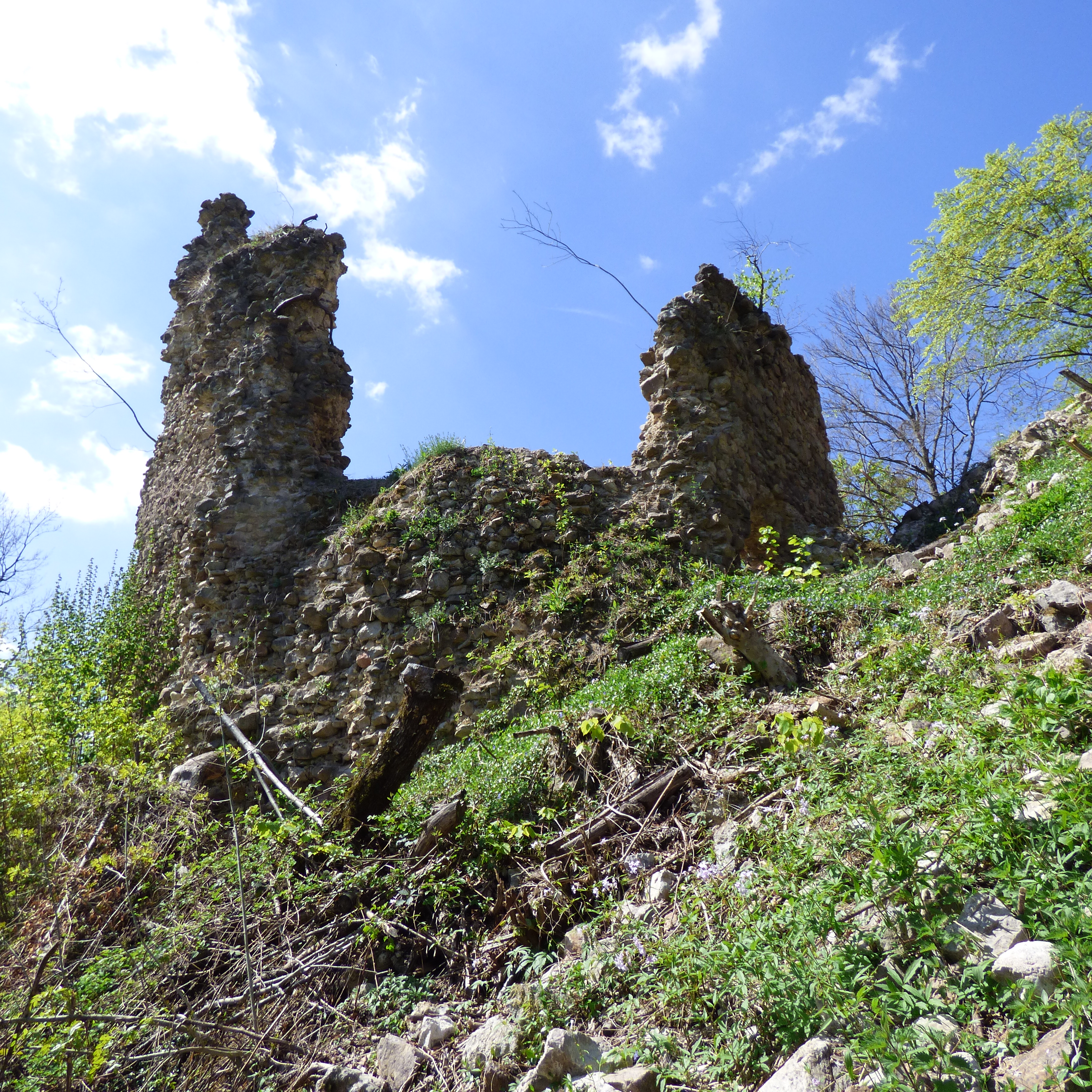 Utvrda Dobra Kuća nedaleko Daruvara se prvi put spominje 1335. godine. Nalazi se u šumovitom kraju na vrhu uzvišenja s strmim prilazom. Utvrdu su činile tri prostorije za stanovanje, branič kula, ulazna vrata i cisterna u središtu dvorišta.